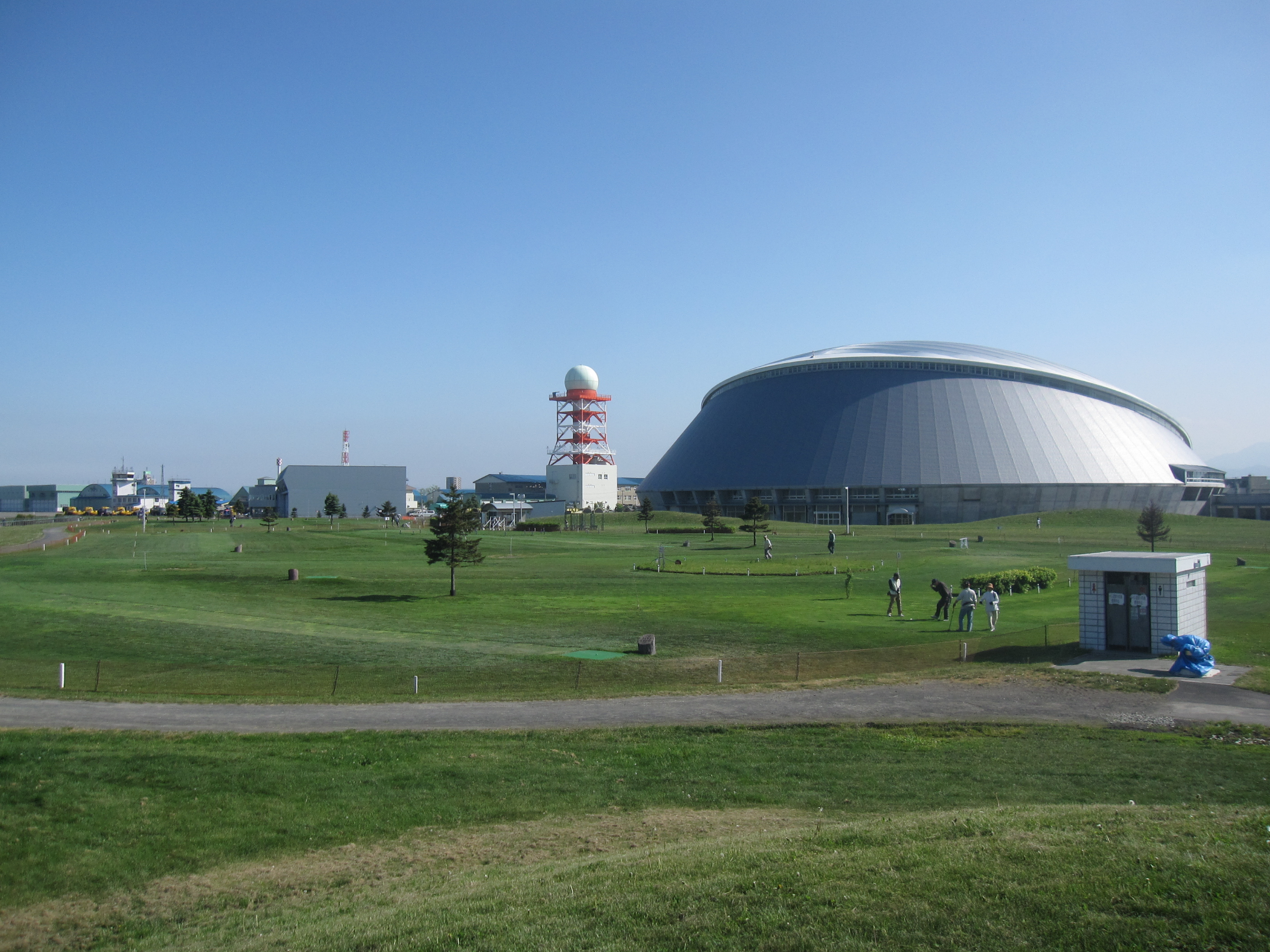 コミュニティドームつどーむ Sapporo Community Dome "Tu-Dome"